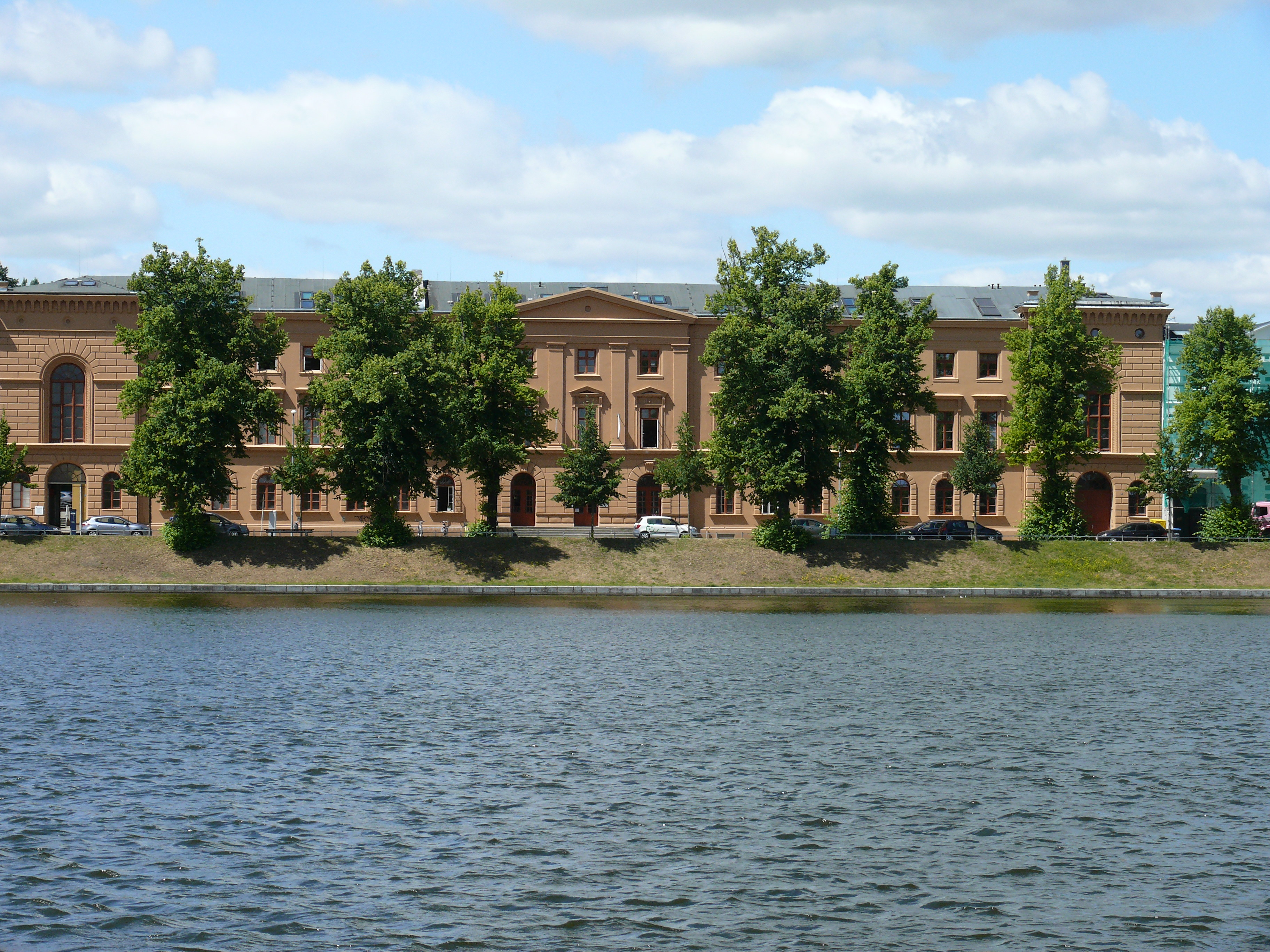 Das Gebäude "Alexandrinenstraße 19" in Schwerin. Blick über den Pfaffenteich hinweg.